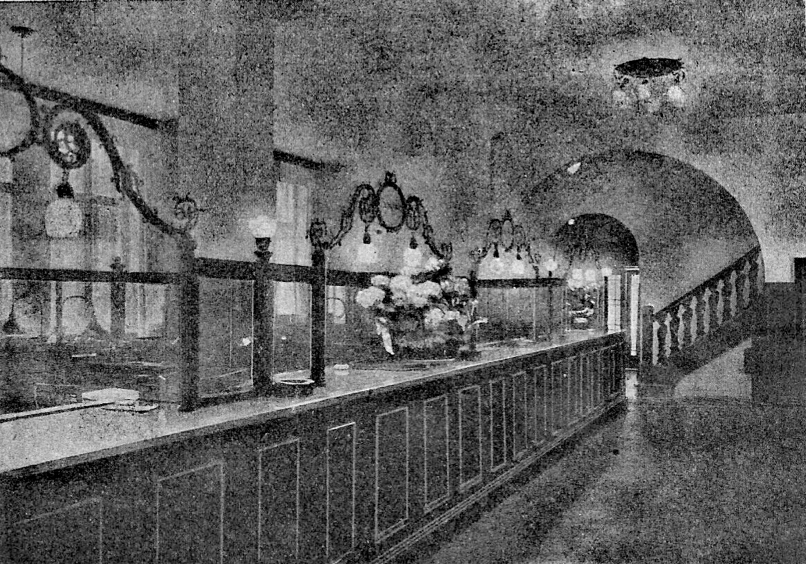 Fassade und Innenraum des neuen Gebäudes, Ecke Breite Straße und Hüxstraße, in das jetzt die Nationalbank für Deutschland, Zweigniederlassung Lübeck ihren Geschäftsbetrieb verlegt hat. An Stelle der früheren Stätte des Metropol-Theaters ist ein ruhig wirkender Bau getreten. Zweckmäßig war auch die Einrichtung der Geschäftsräume, die vorläufig nur der Kellerräume und das Erdgeschoss einnahmen, gehalten. Nach deren Ausbau sollte später auch die erste Etage für den Bankbetrieb verwendet werden. Der Umbau wurde von den Berliner Architekten Zerbe und Harder geleitet, sämtliche Arbeiten waren jedoch lübeckischen Firmen übertragen worden. Ursprünglich waren die Räume für die Einrichtung einer Filiale der Darmstädter Bank vorgesehen; da die Banken jedoch indes eine Interessengemeinschaft gebildet hatten, aus ihnen sollte noch im selben Jahr die DANAT hervorgehen, konnten die Interessen beider Banken in Lübeck durch die Nationalbank für Deutschland vertreten werden.